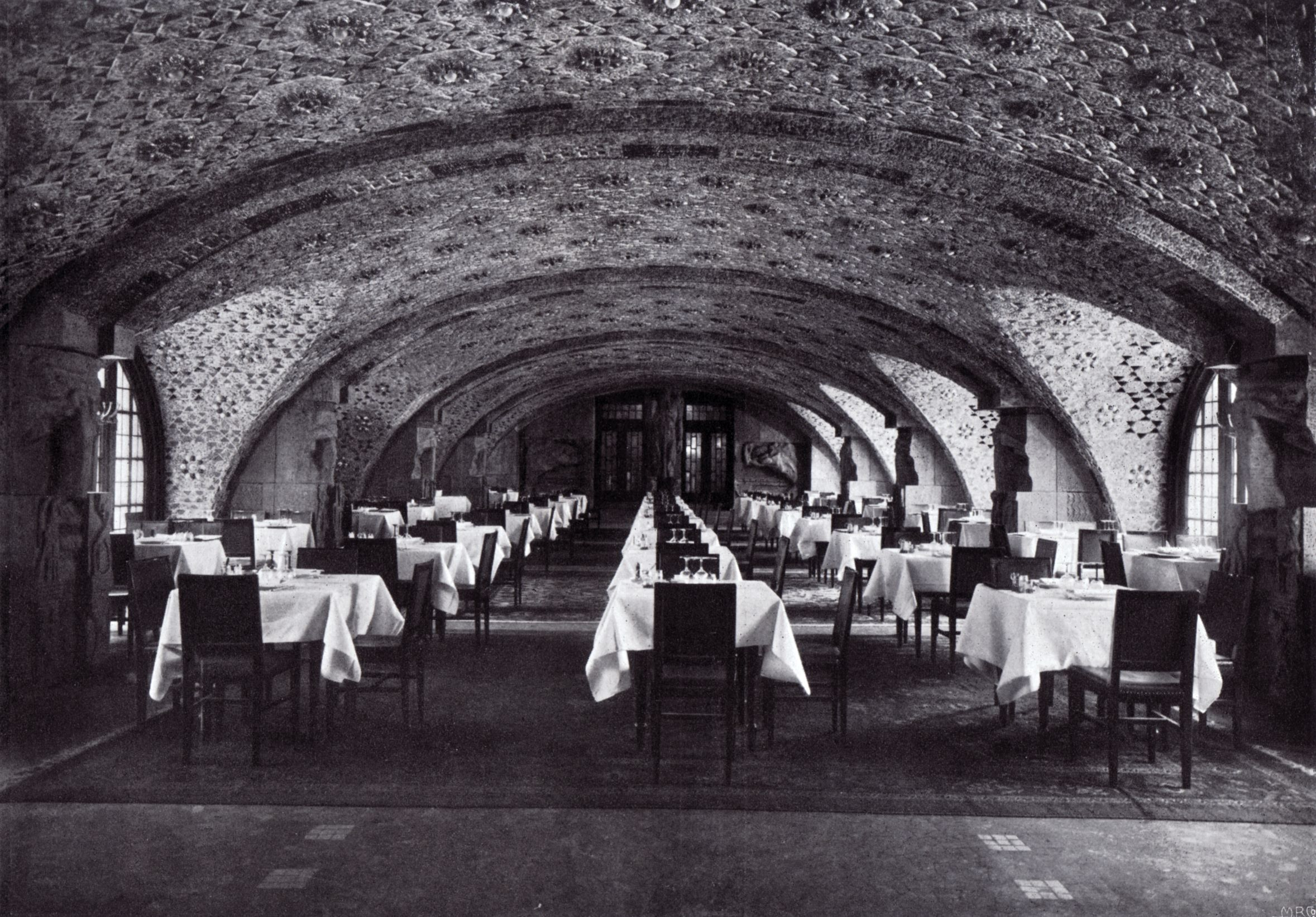 Berlin - Weinhaus Rheingold, Ansicht des Steinsaals